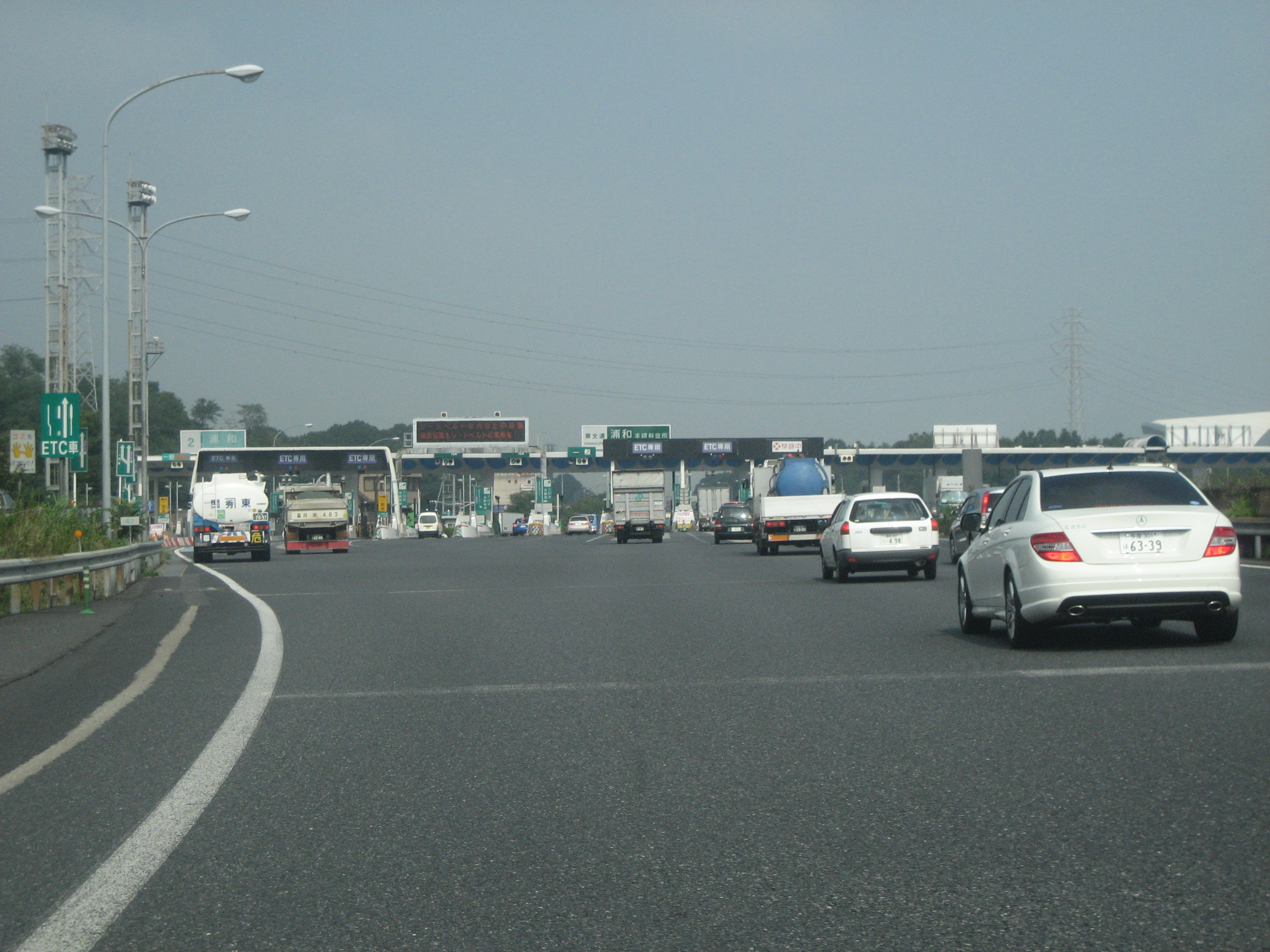 東北自動車道浦和本線料金所